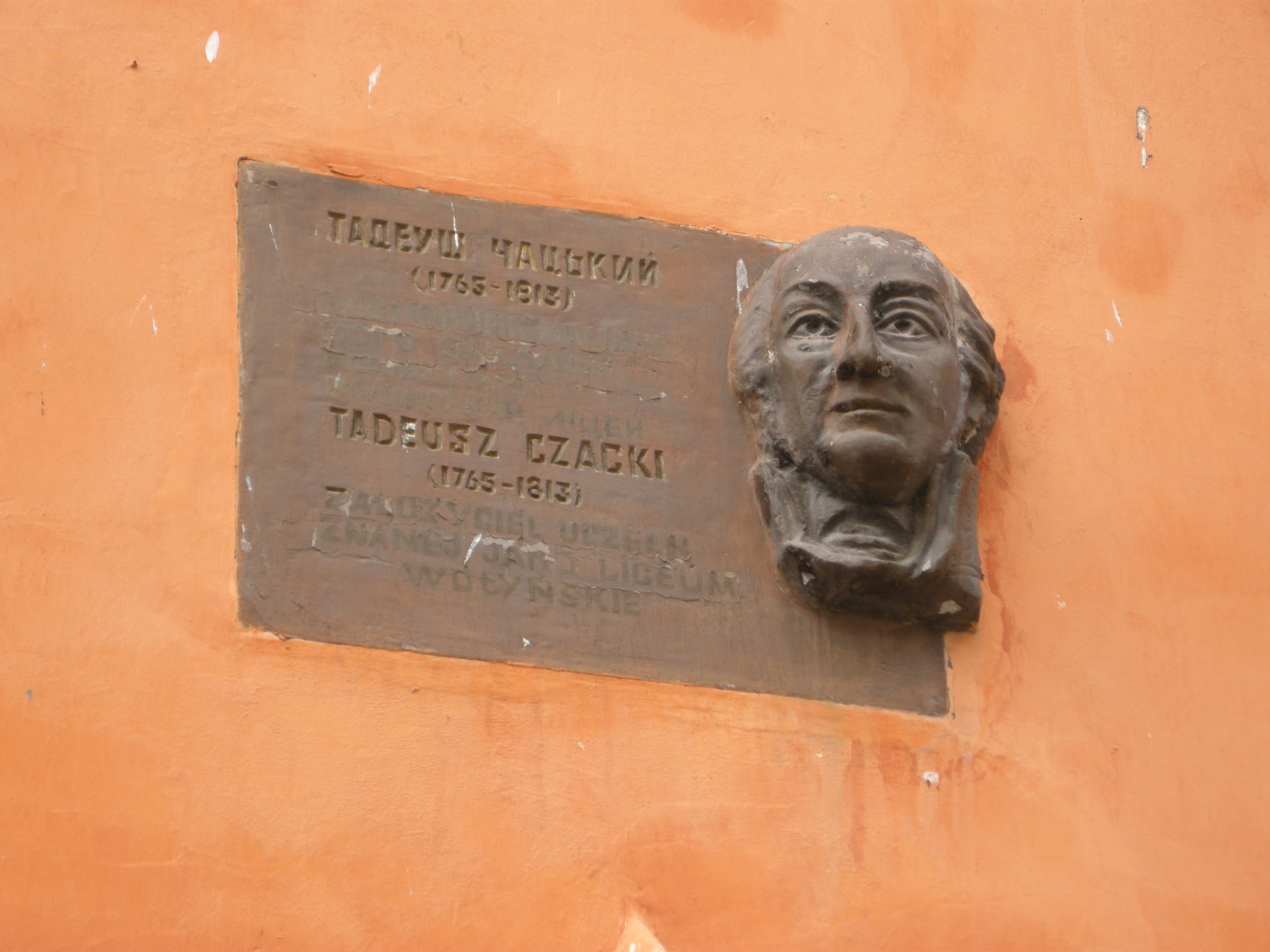 Пам`ятна дошка Тадеушеві Чацькому на фасаді Кременецького ліцею.